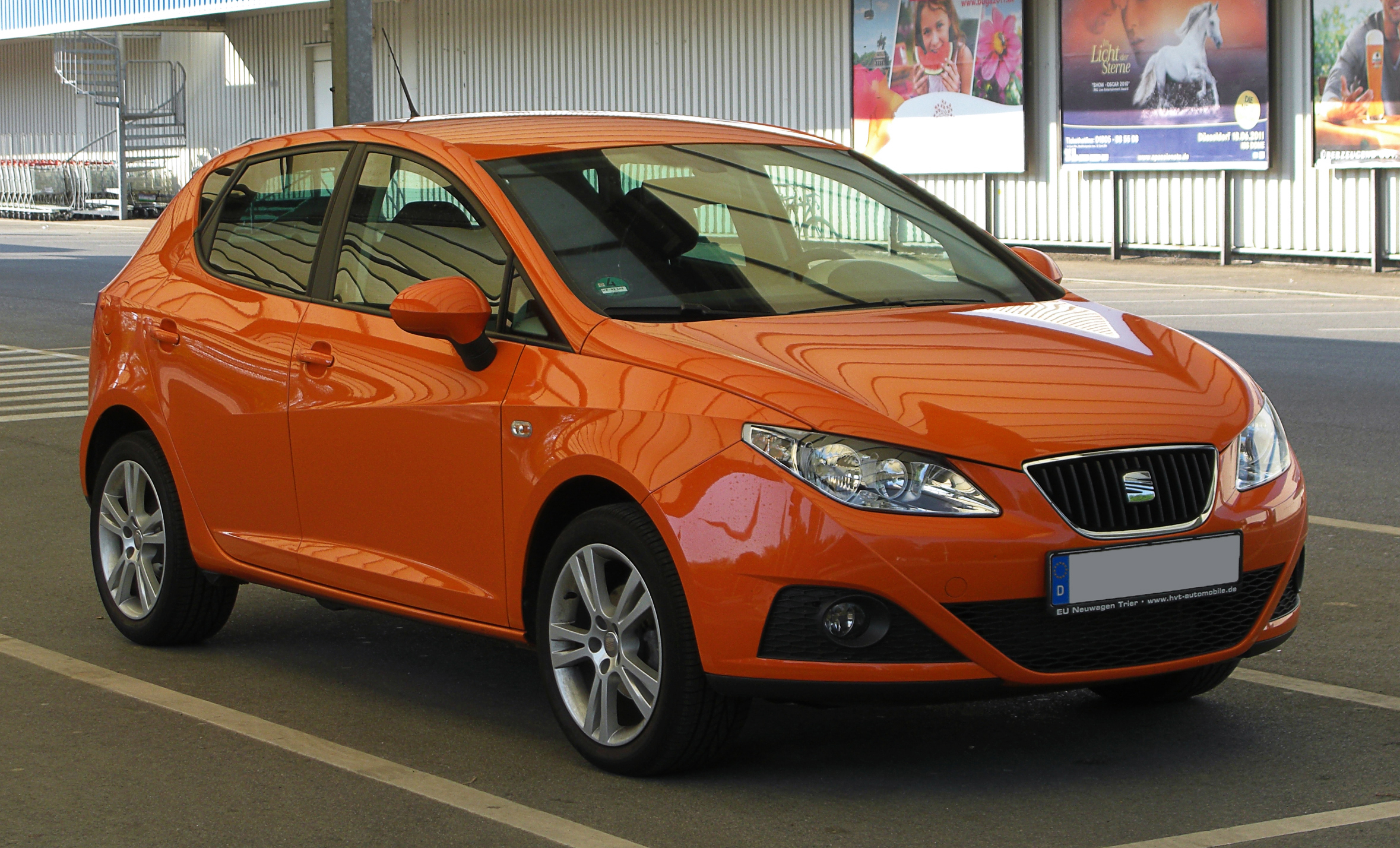 Seat Ibiza (6J)